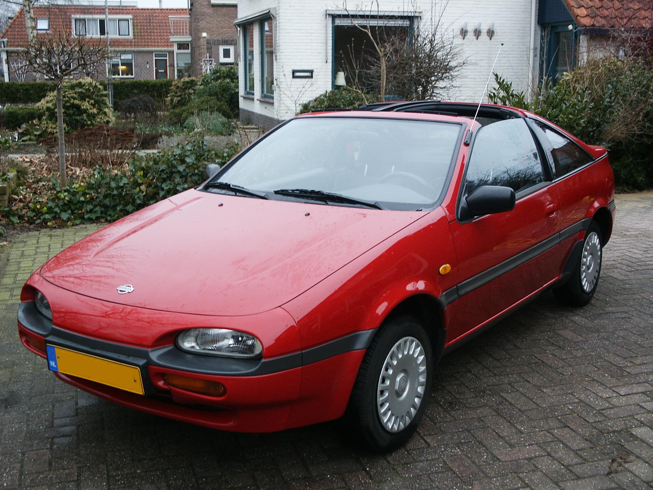 Nissan 100NX 1.6 carburateur, 1992